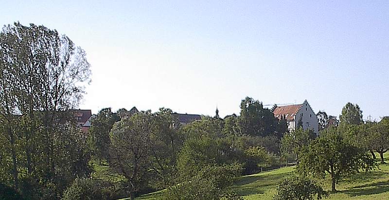 Das Bittelbrunner Schlössle, die Zwiebelturmspitze der Dorfkirche sowie die Zehntscheuer.